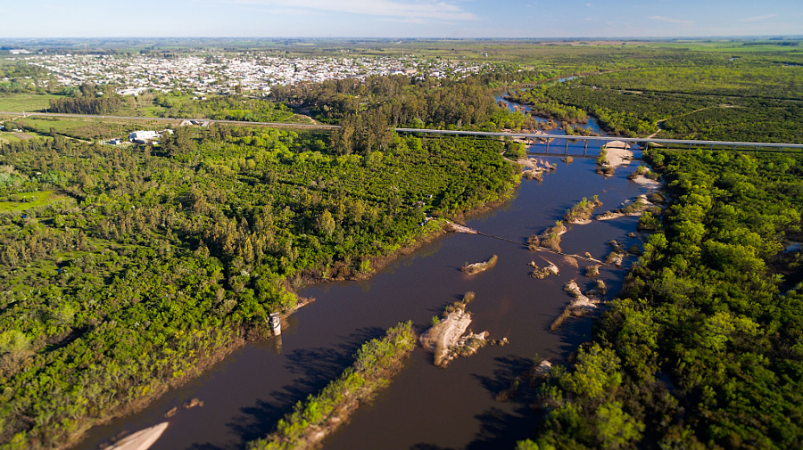 Панорамный вид на Санта-Лусия (Уругвай)